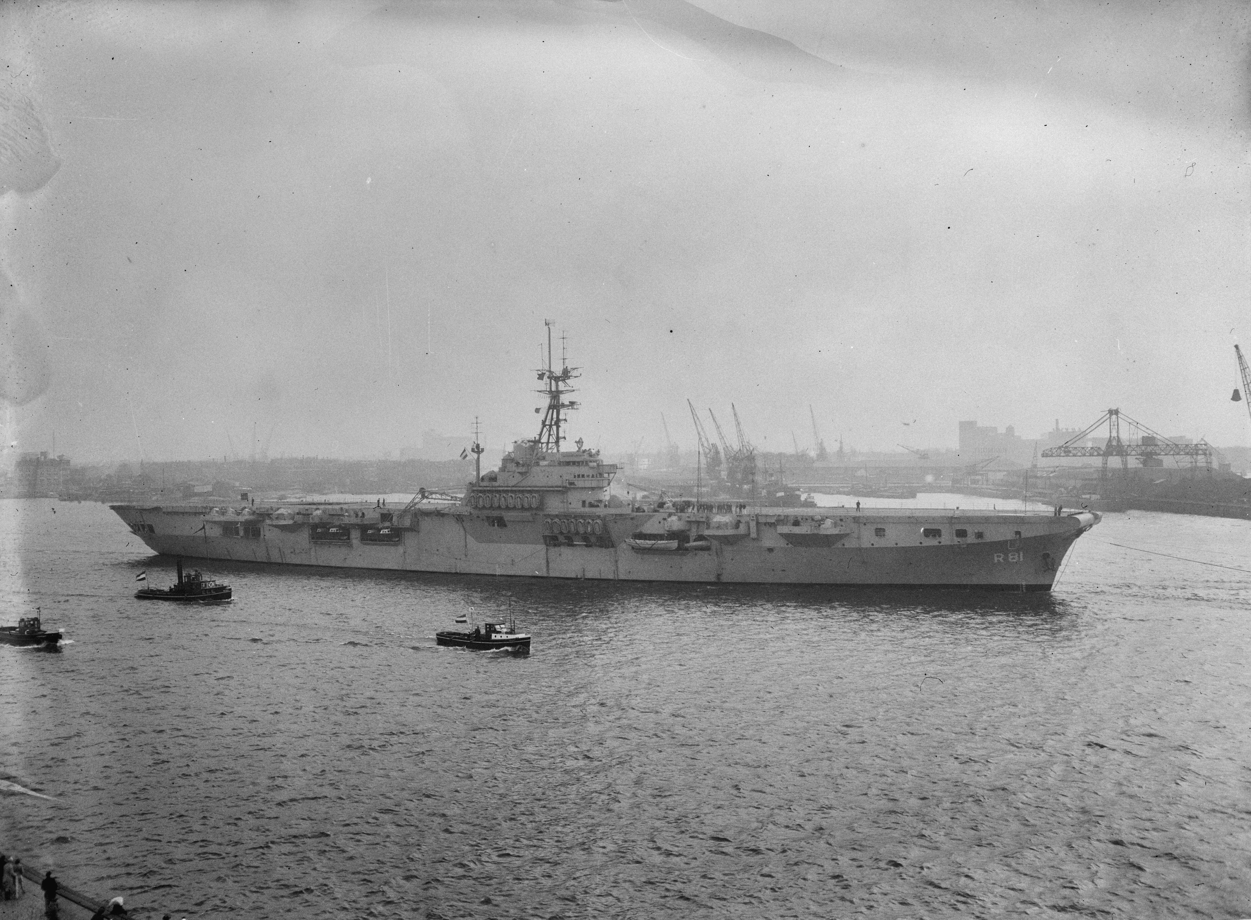 Collectie / Archief : Fotocollectie Anefo Reportage / Serie : [ onbekend ] Beschrijving : Karel Doorman en De Bitter naar Middellandse Zee Datum : 9 november 1950 Fotograaf : Winterbergen, […] / Anefo Auteursrechthebbende : Nationaal Archief Materiaalsoort : Negatief (zwart/wit) Nummer archiefinventaris : bekijk toegang 2.24.01.04 Bestanddeelnummer : 904-2866